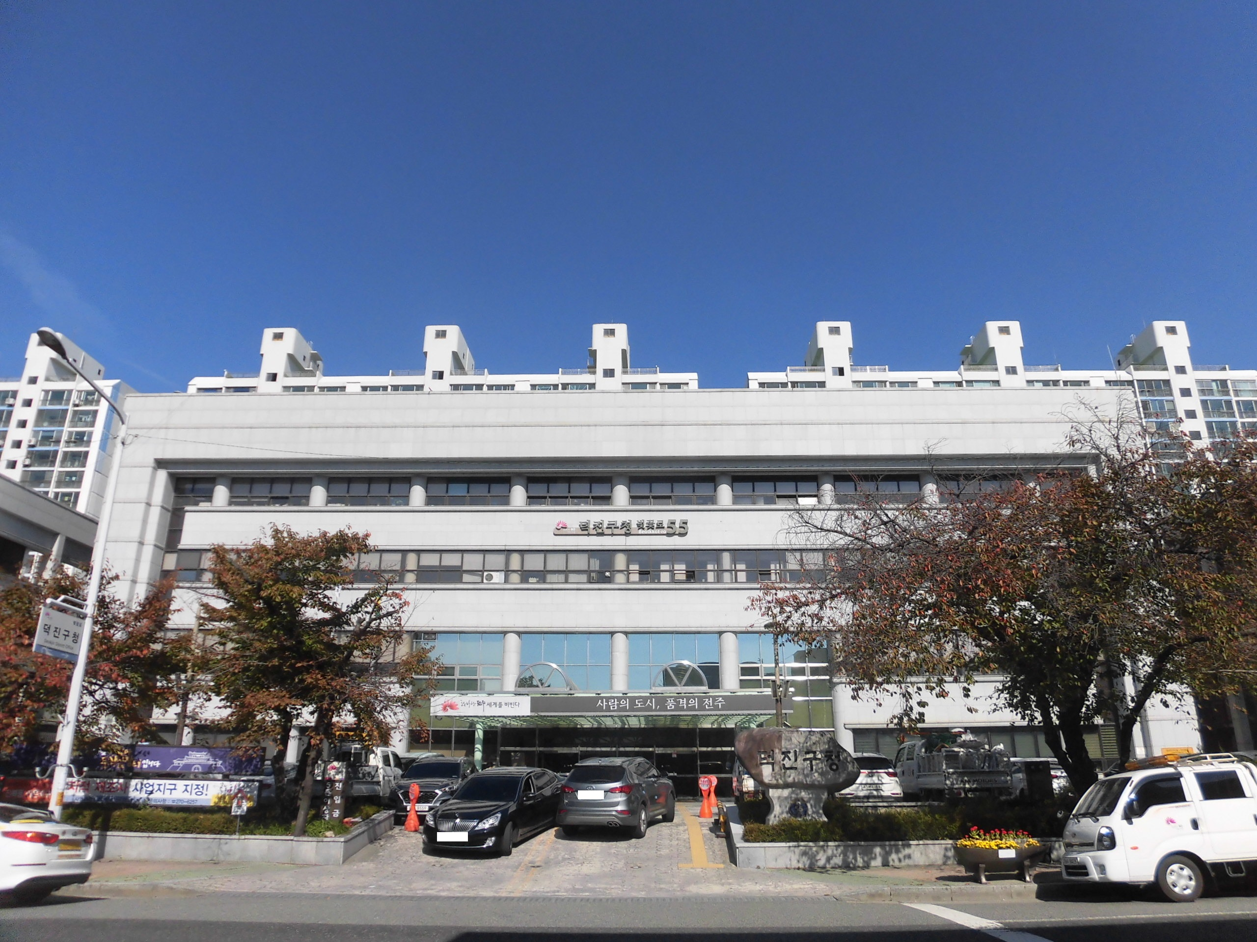 전라북도 전주시에 있는 덕진군청